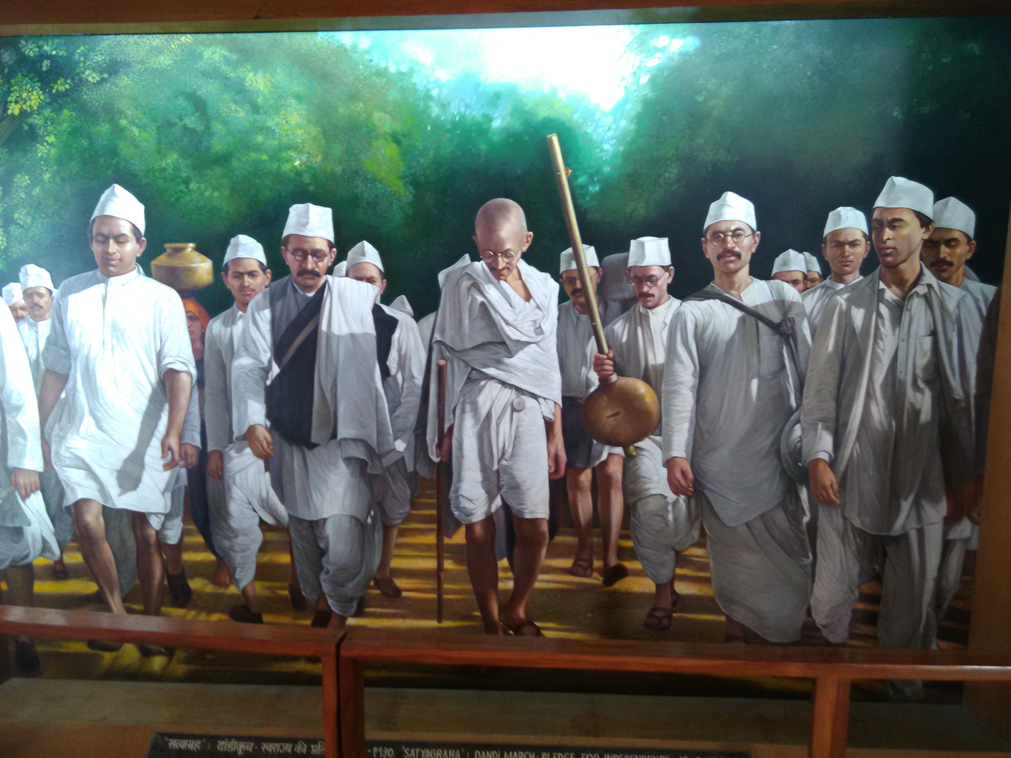 ଓଡ଼ିଆ: "Quit India Movement " , photo at Gandhi Memorial , Sabarmati Ashram , Ahamadabad